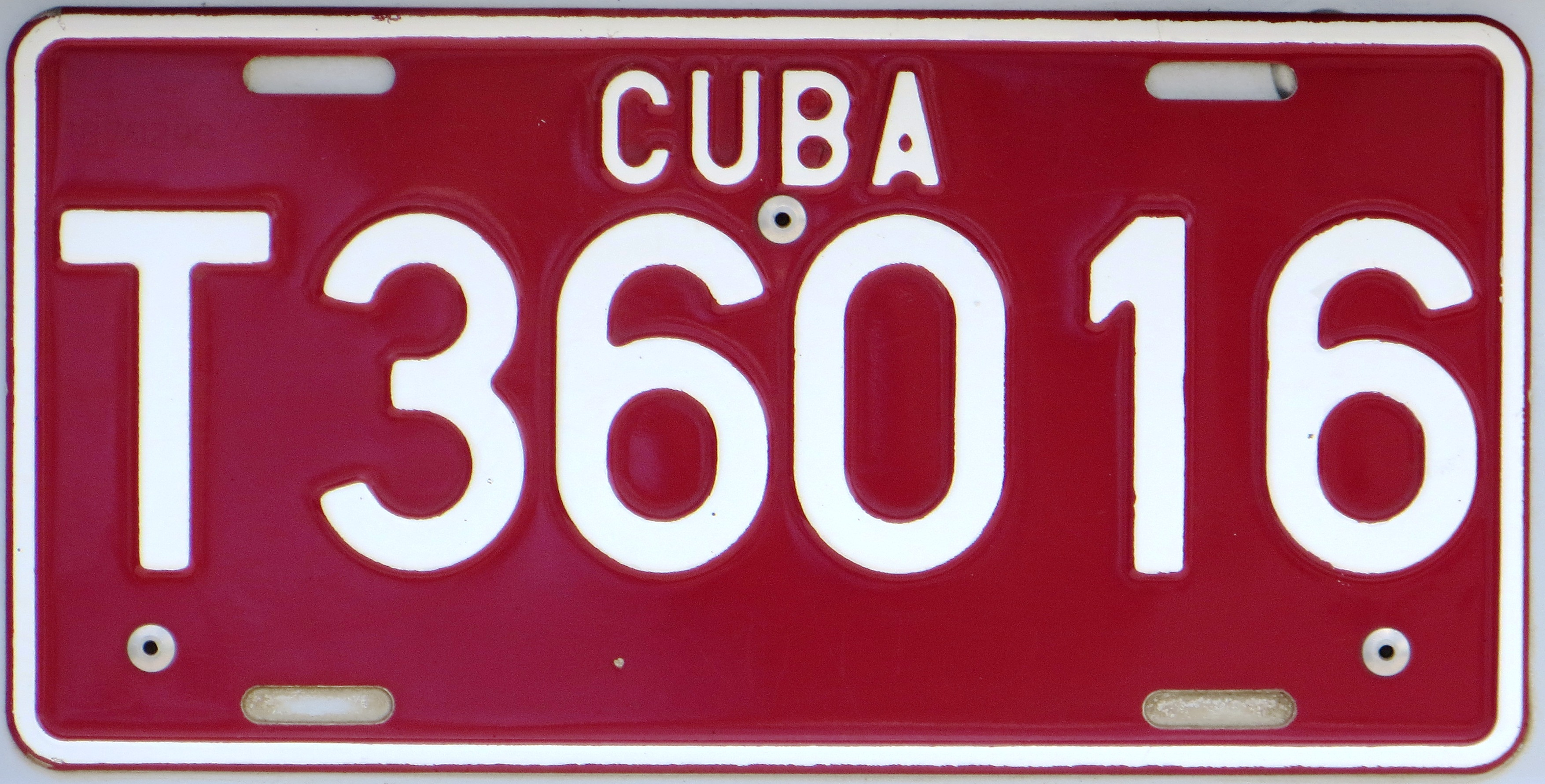 Kentekenplaat uit Cuba